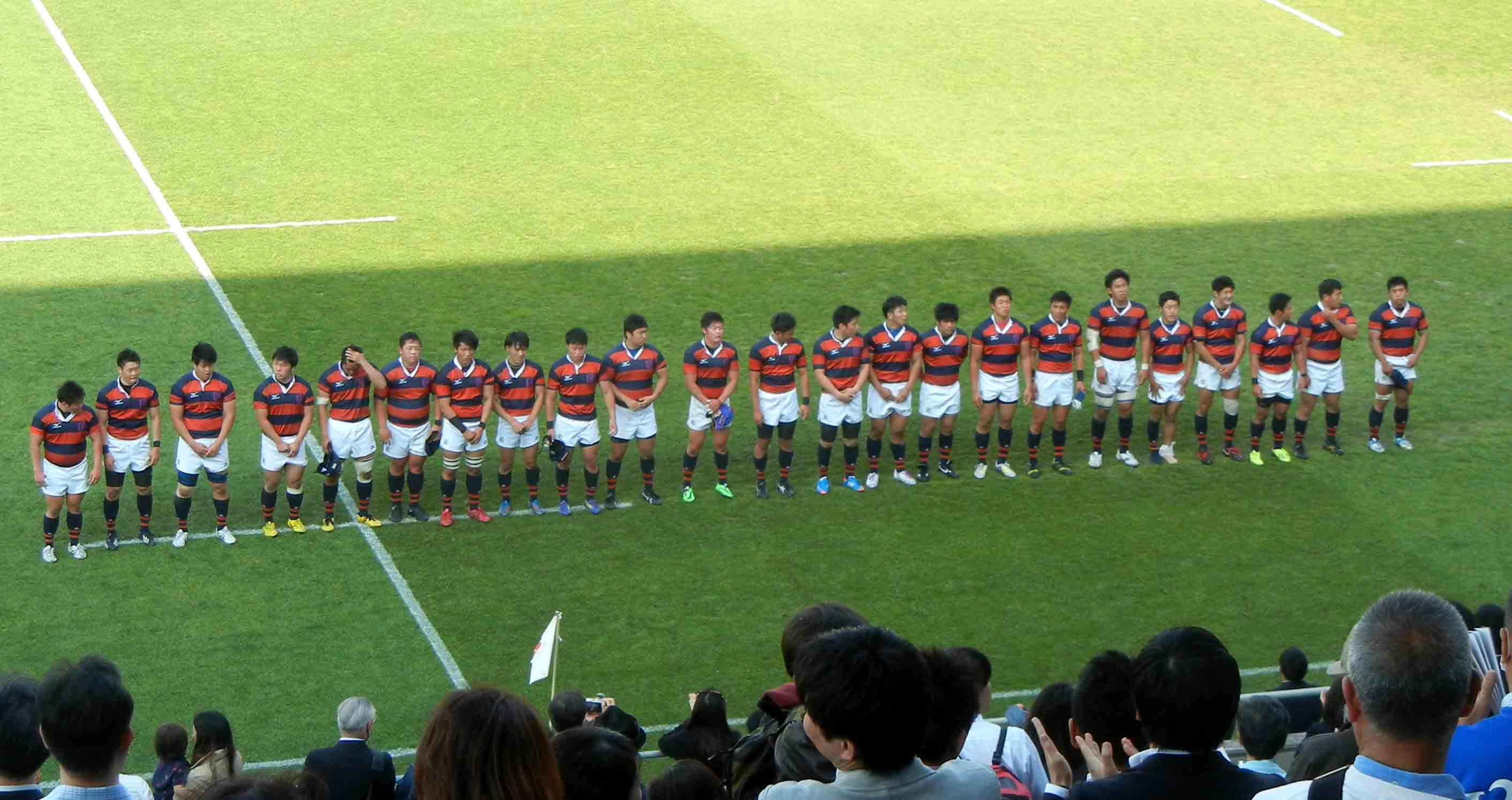 試合後の関西学院の選手達